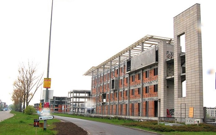 Wilanow Town Hall under construction